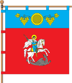 Прапор села Долинське (Ренійський район)